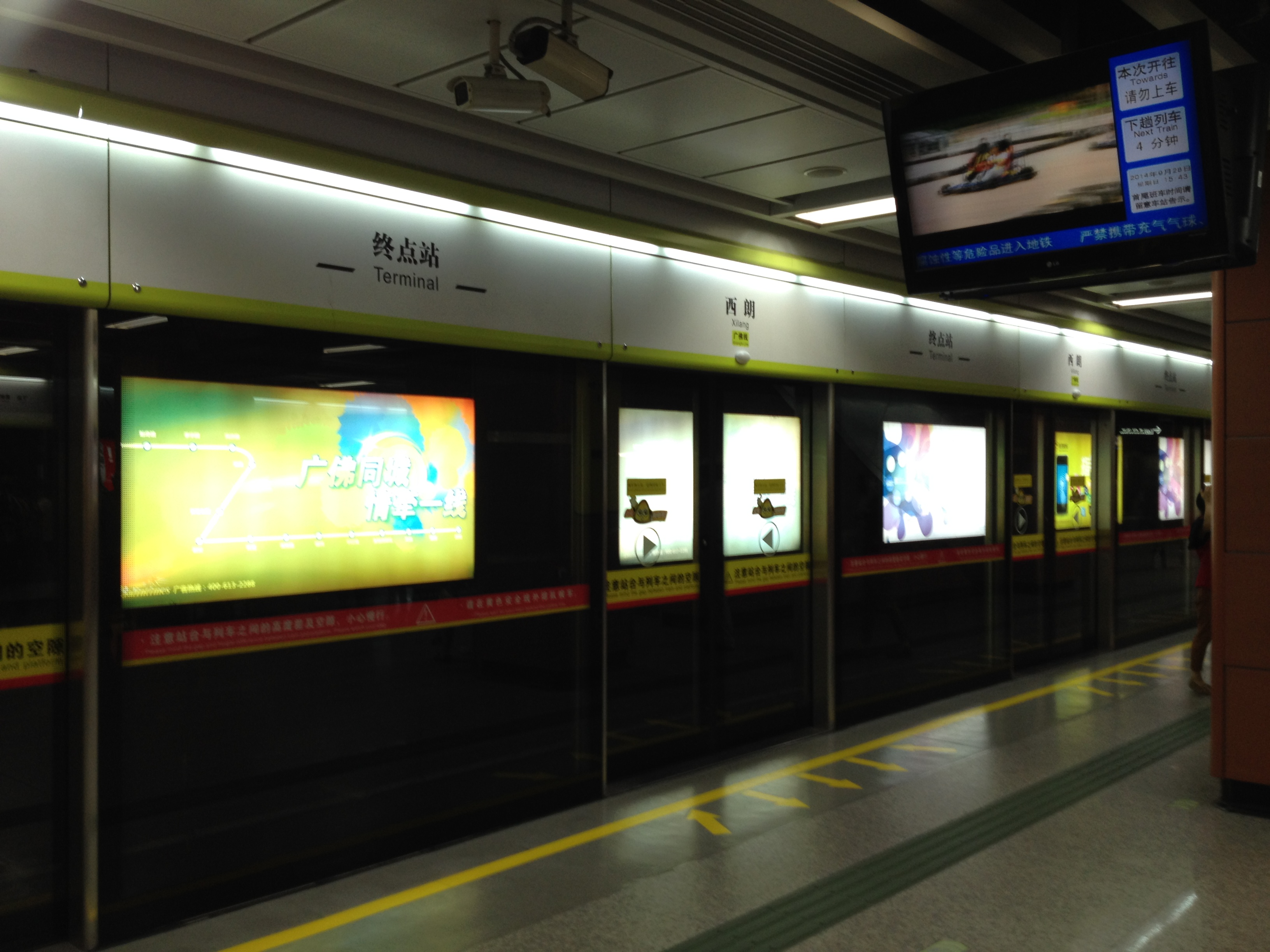 广佛地铁西朗站落客月台